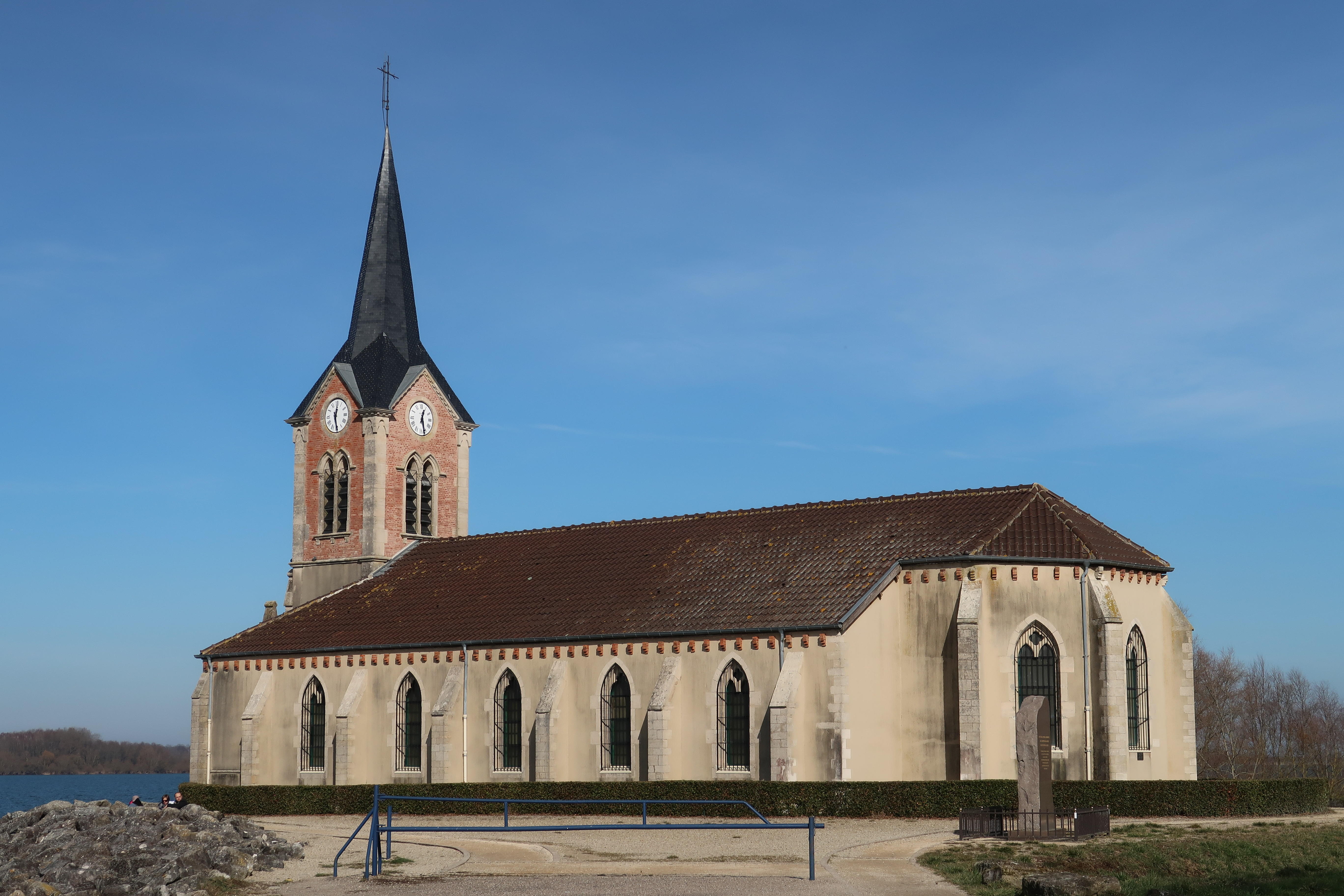 Giffaumont-Champaubert, église St-Laurent